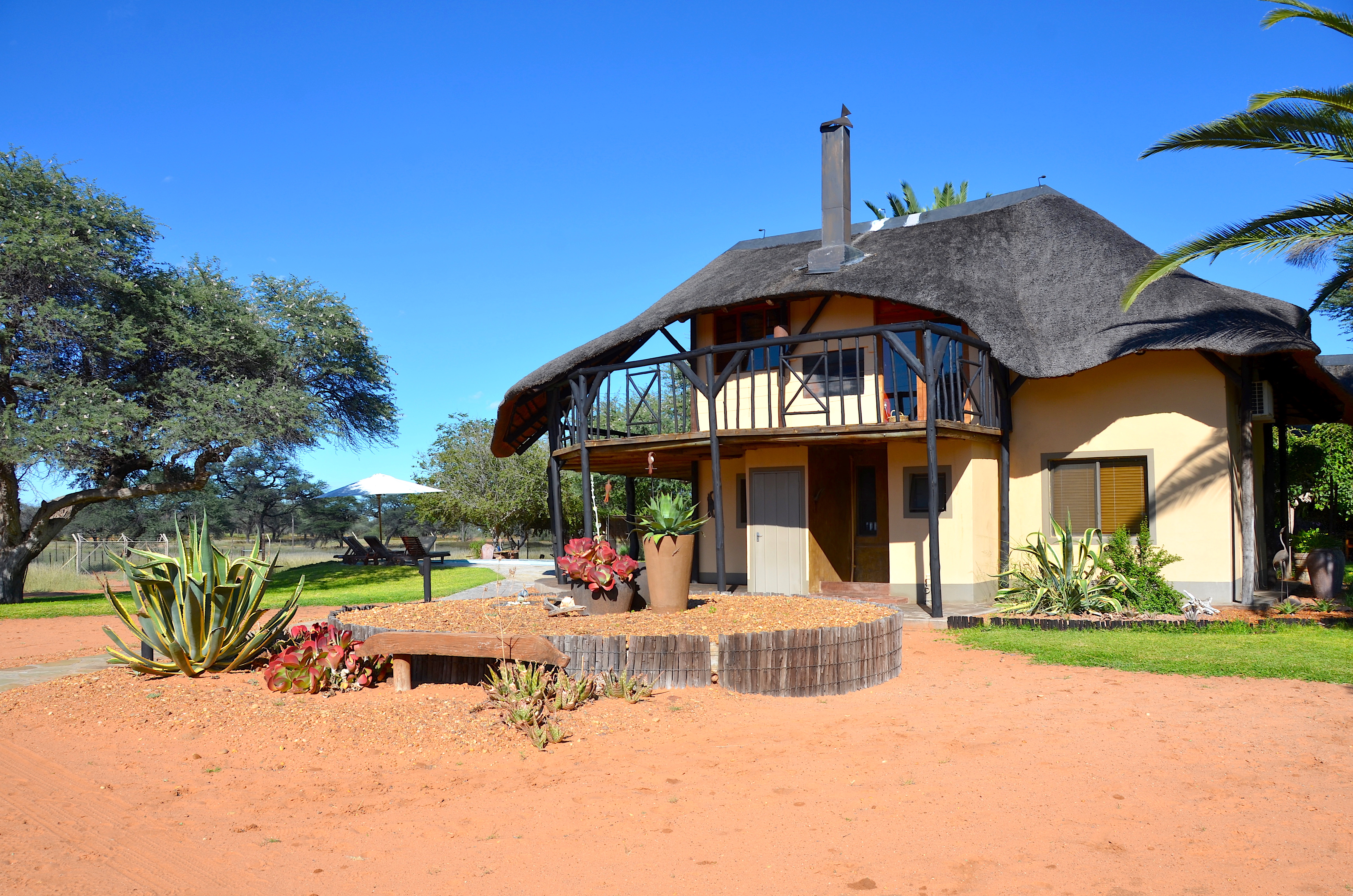 Gästefarm Neuhof in Namibia (2017)